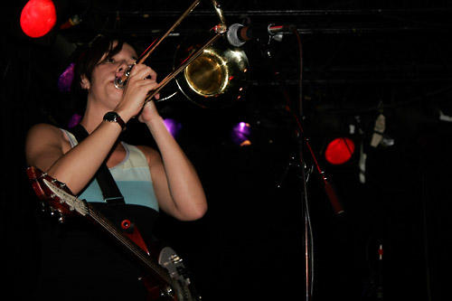 laetitia